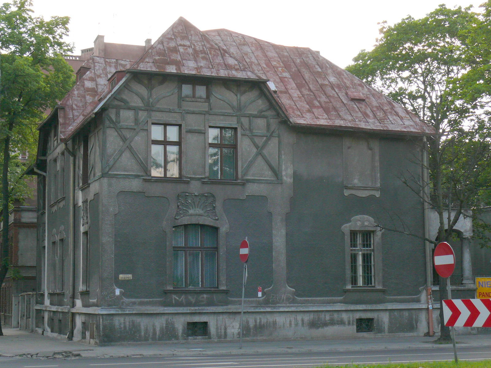 Willa Ryszarda Leona Schimmela przy ul. Karolewskiej 1 Łódź